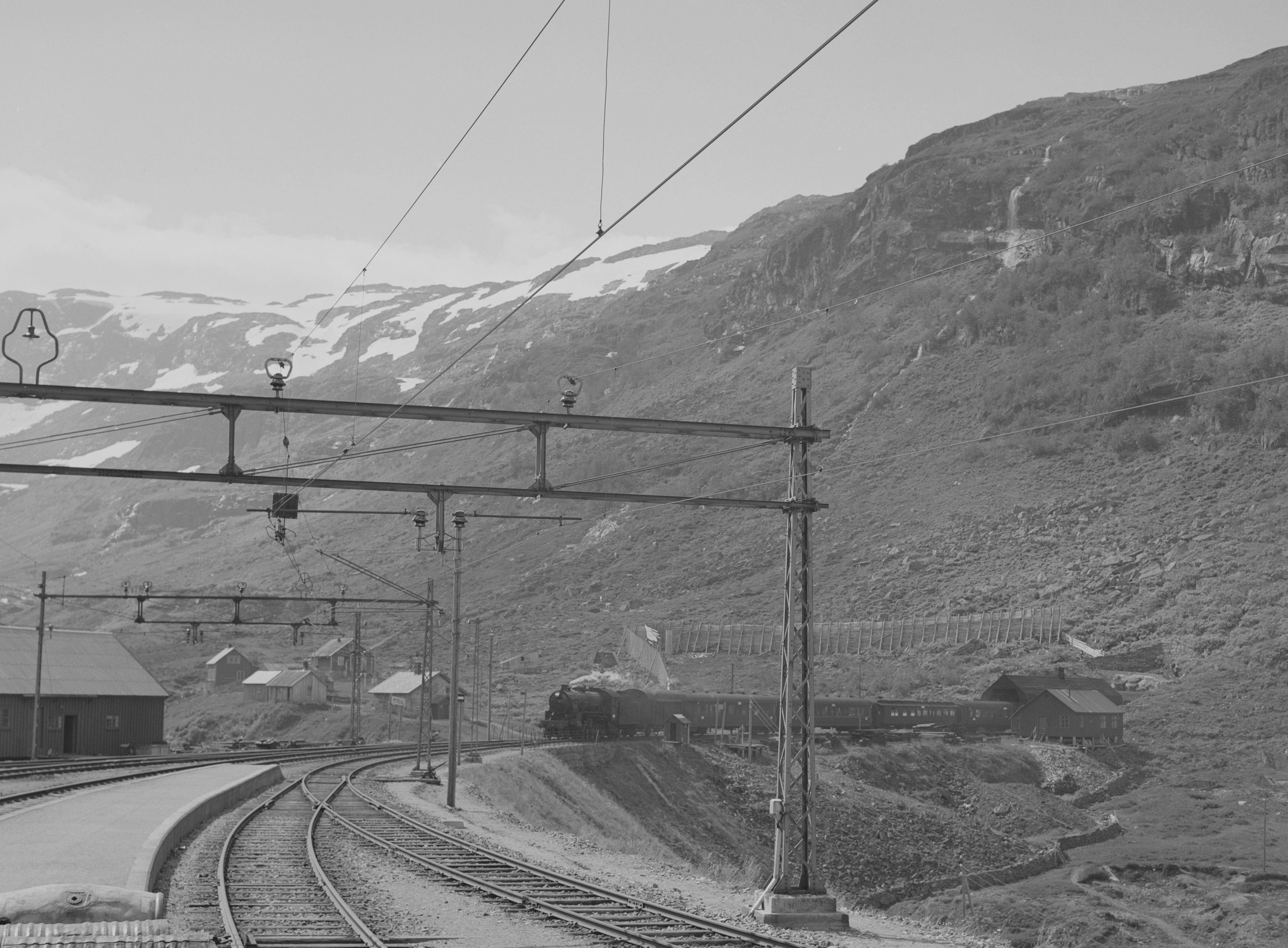 Bildet er hentet fra Nasjonalbibliotekets bildesamling. Anmerkninger til bildet var: fotograf :ukjent Myrdal, Aurland, Sogn og Fjordane